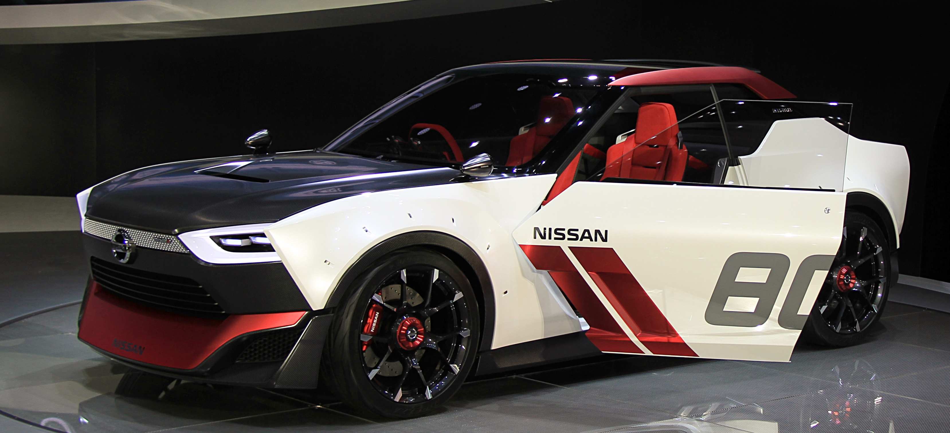 Nissan IDx Nismo